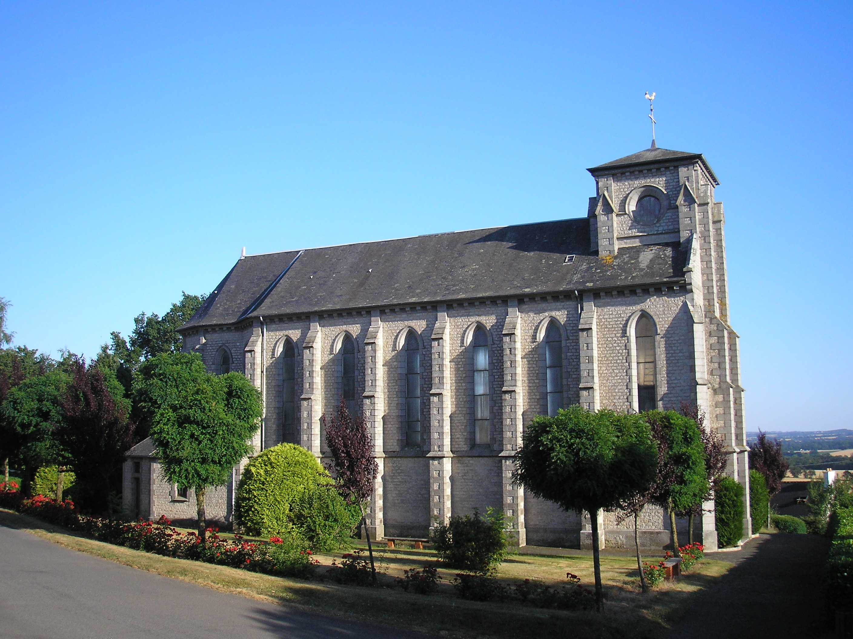 Tessé-Froulay (Normandie, France). L'église Saint-Germain.